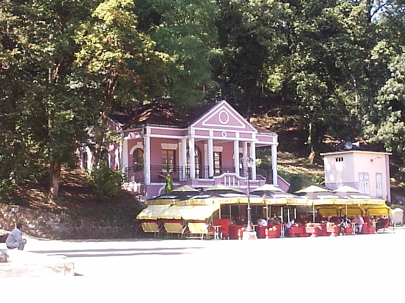 Аутор: Саша Костић, Врњачка бања